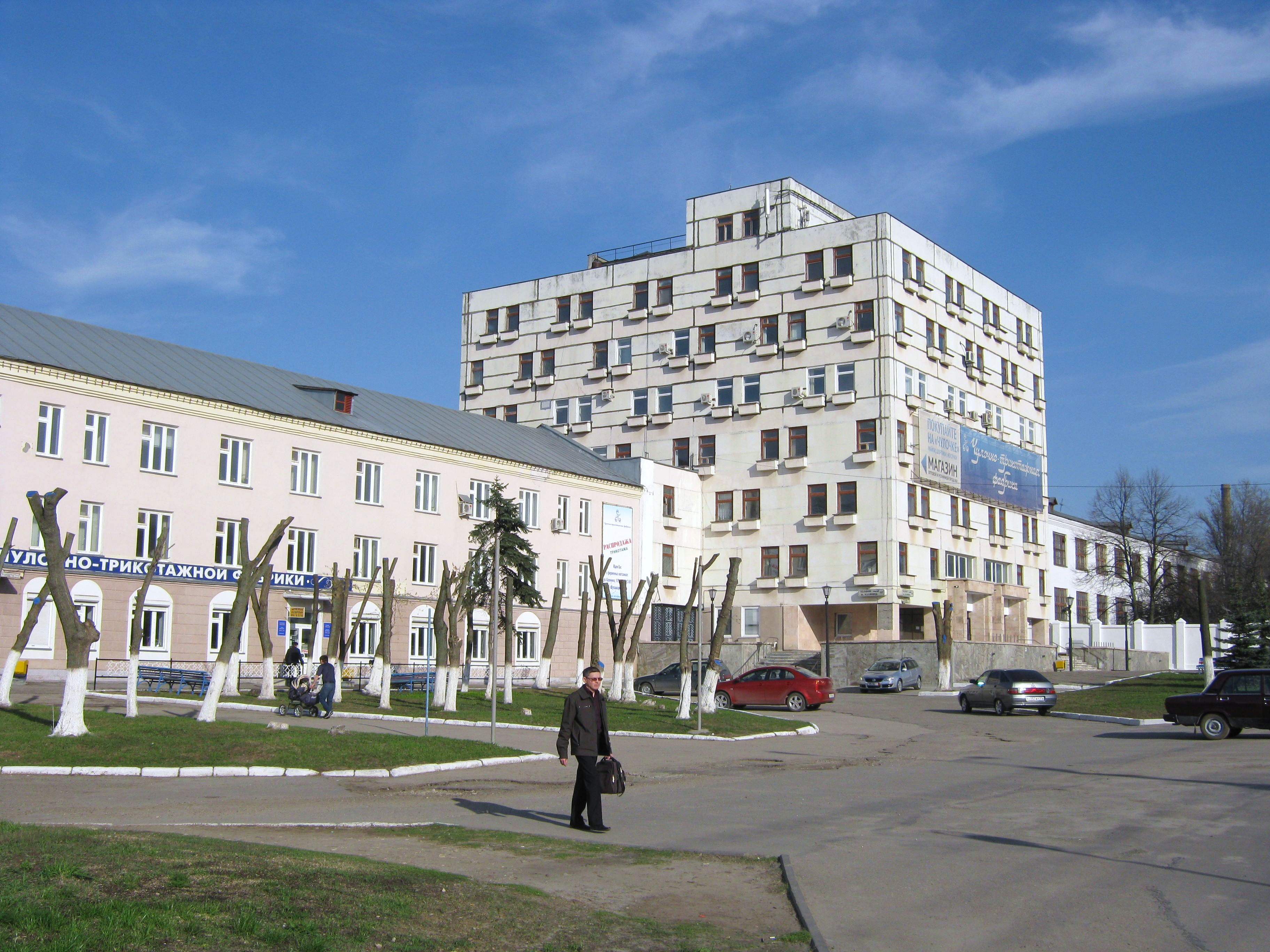 ОАО "Чебоксарский трикотаж" (г.Чебоксары)